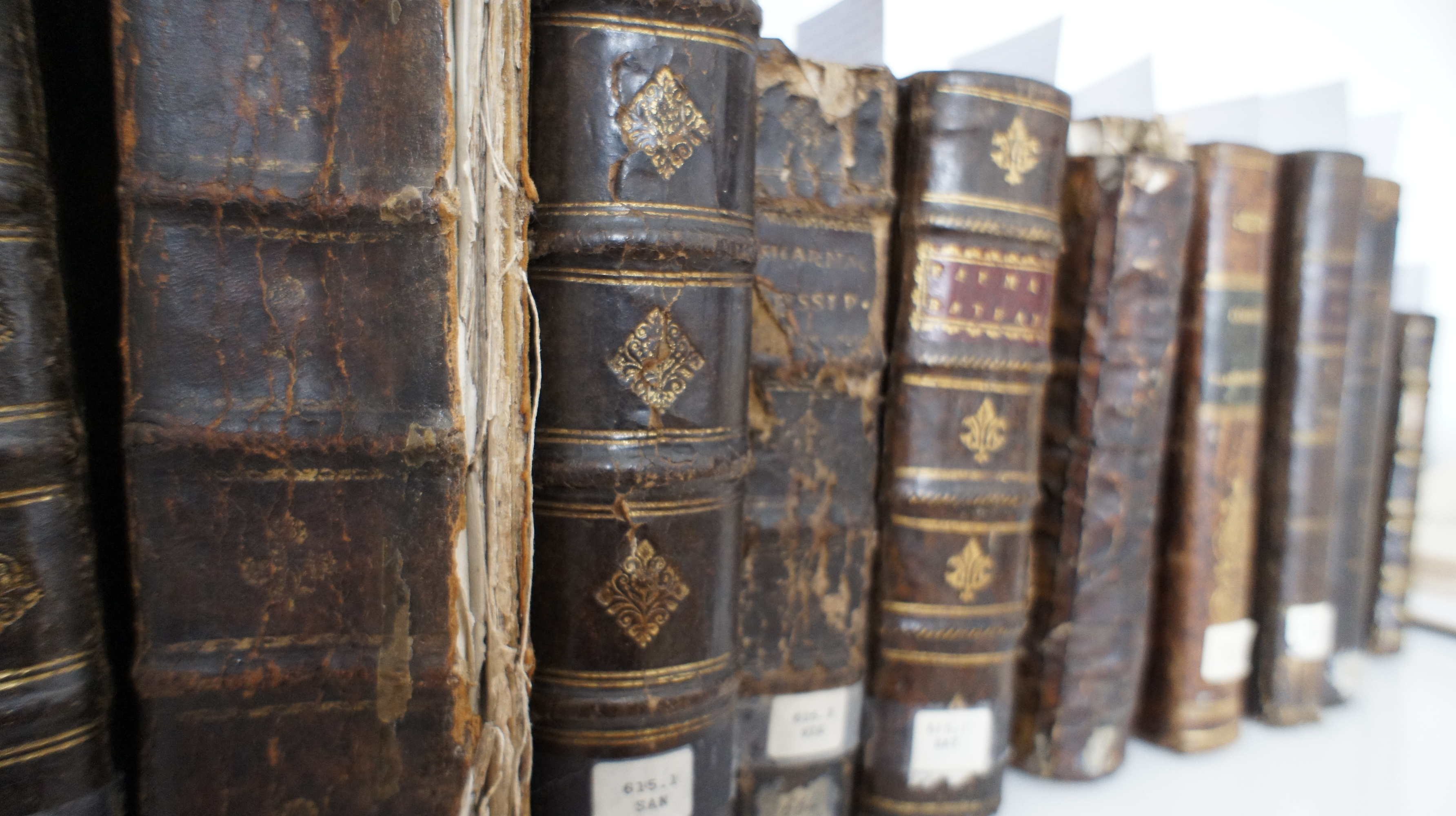 coleção farmacopeias